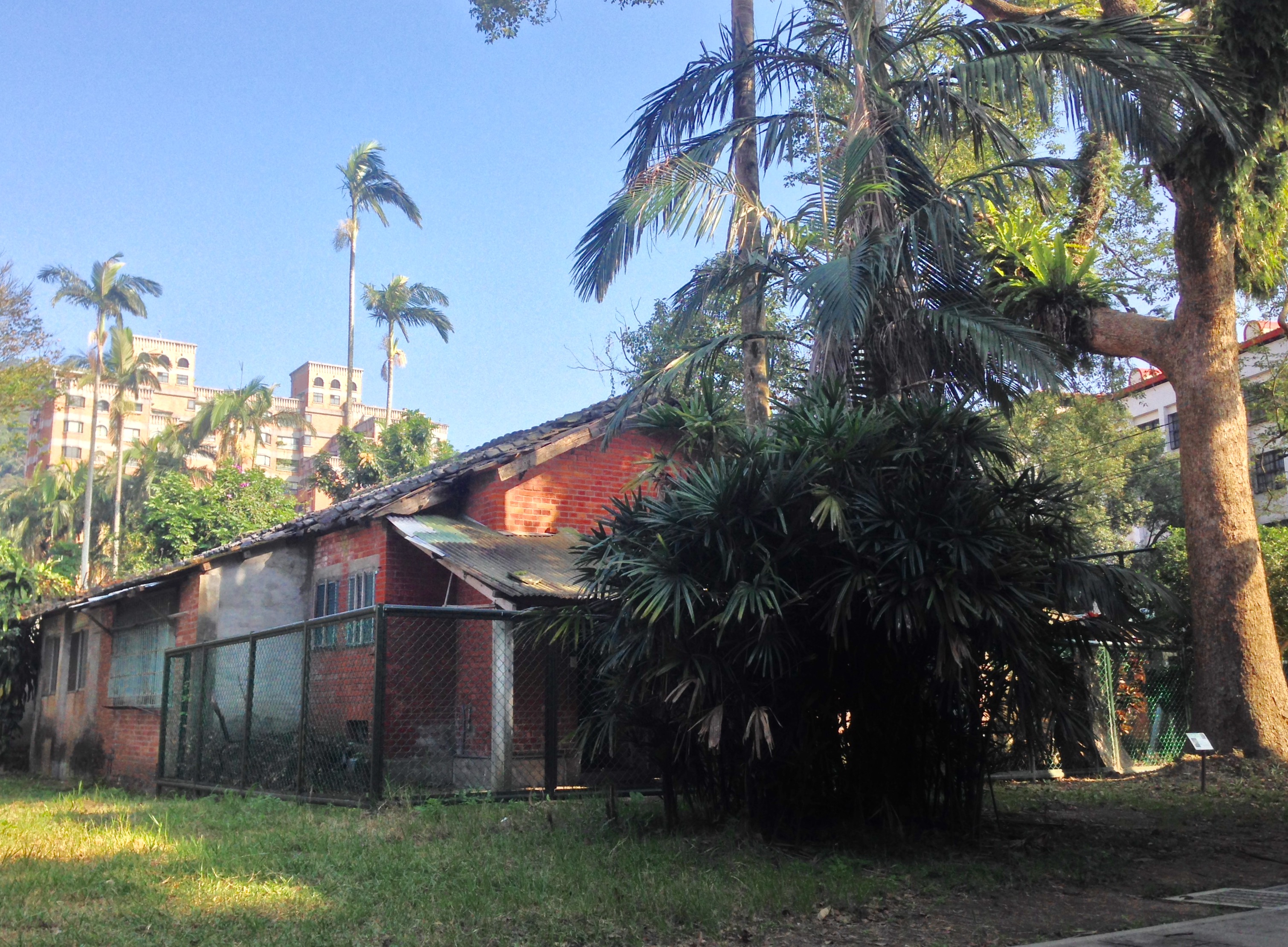 中文（台灣）: 新店國小宿舍(新店區國校路7號)